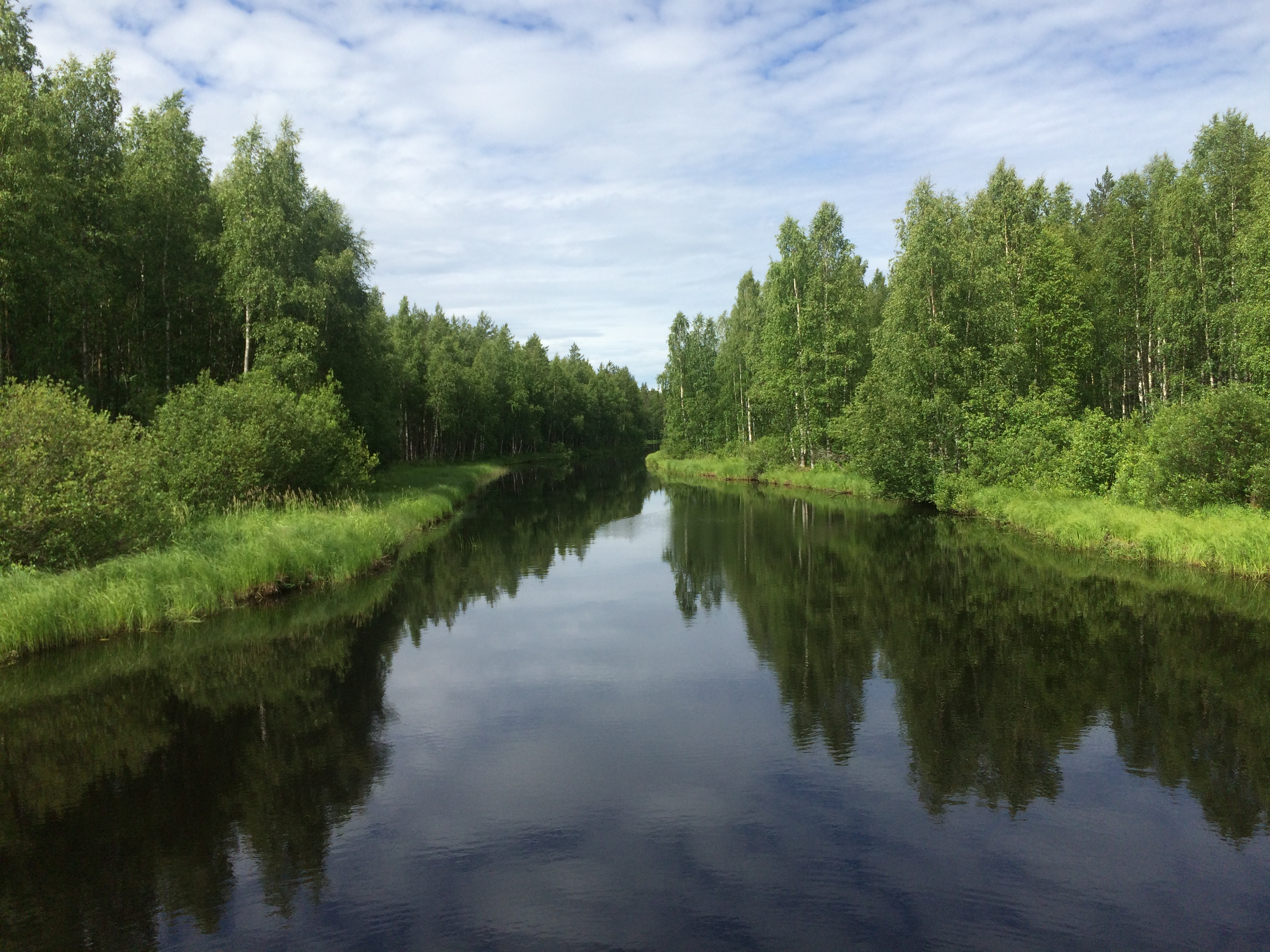 Соанйоки